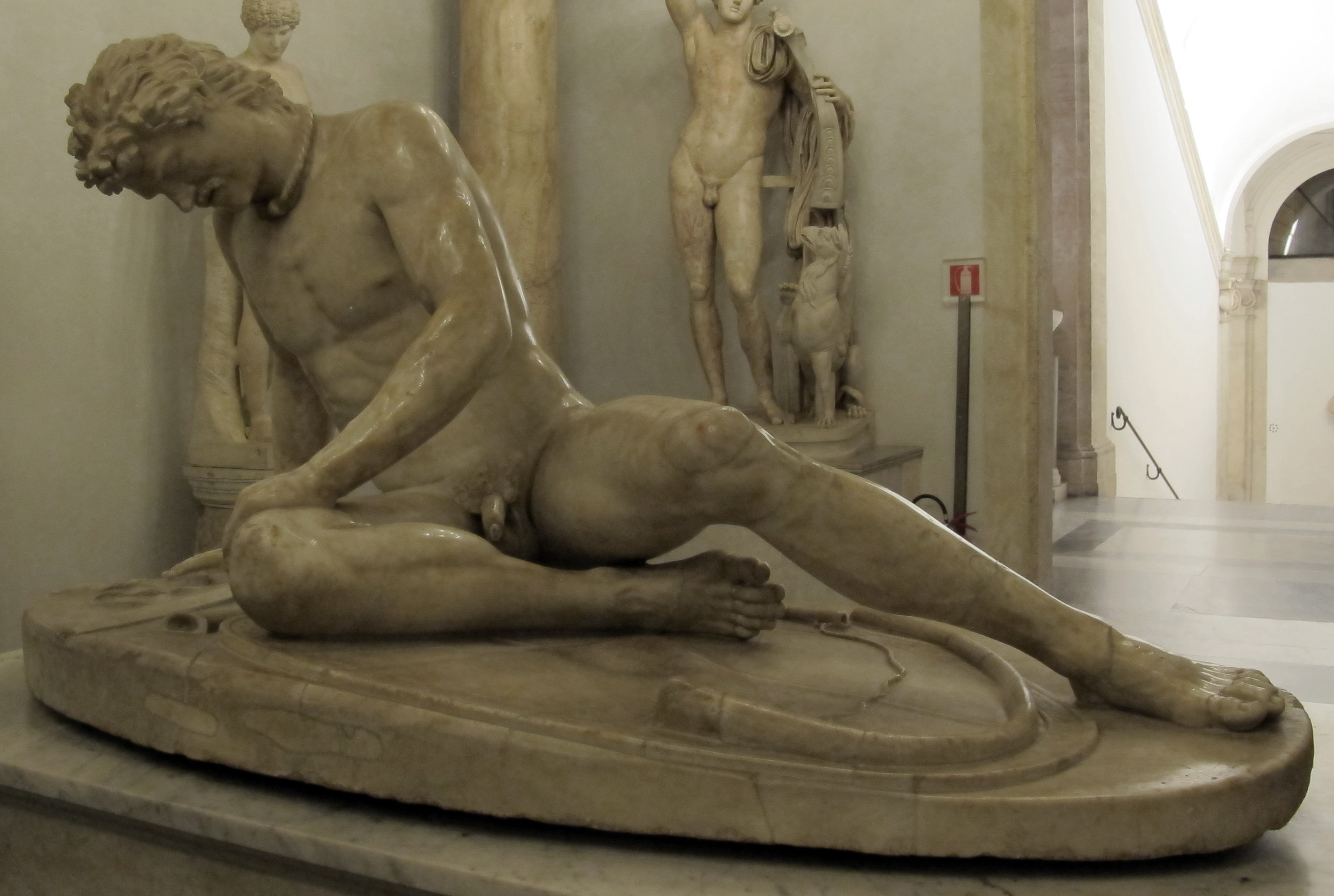 Musei Capitolini